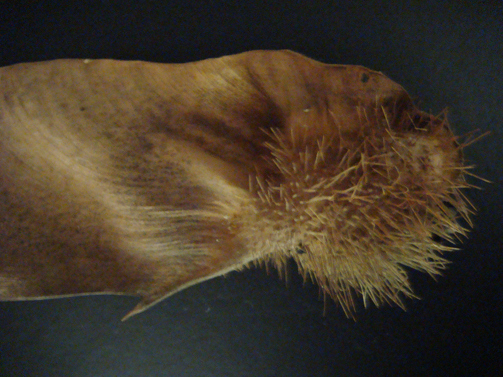 centrolobium seed